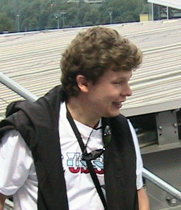 Аркадий Белый во время Евро-2008 на стадионе в Инсбруке